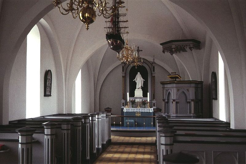 Vester Egede Kirke i Danmark. Skibet set mod øst